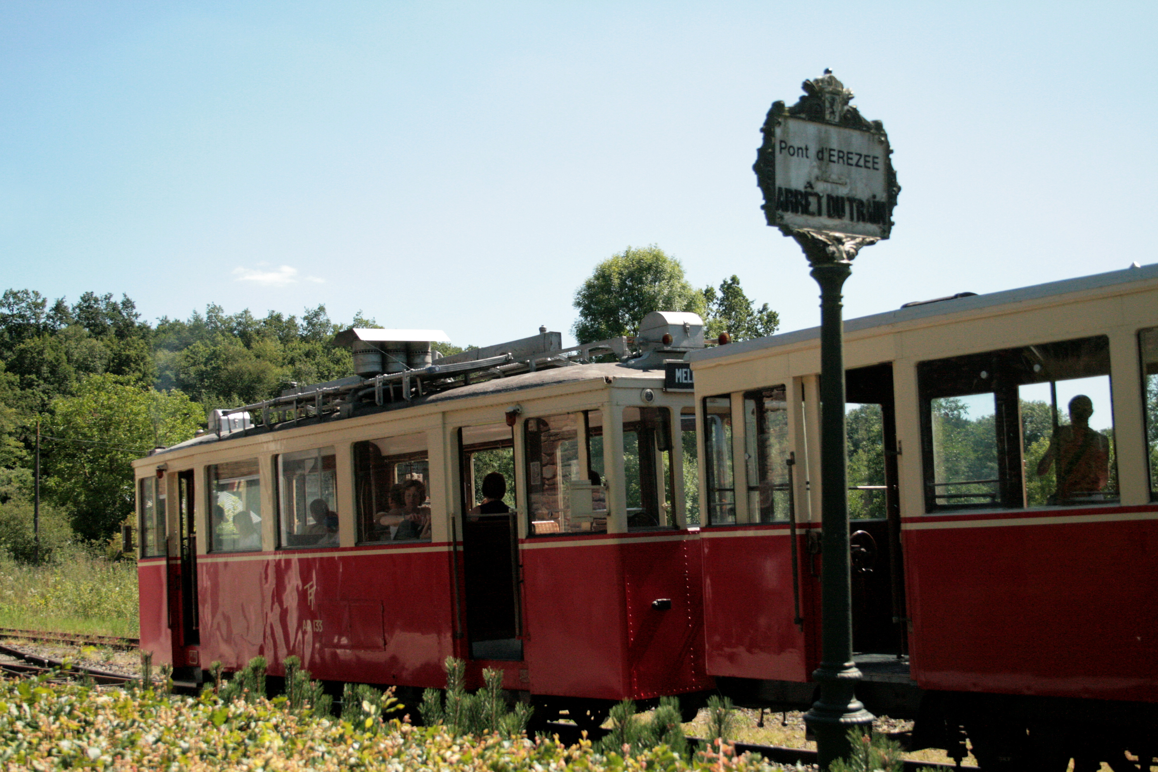 Tramway diesel du type AR 133 à l'arrêt au Pont d' Erezée (Belgique) - Tramway touristique de l'Aisne.